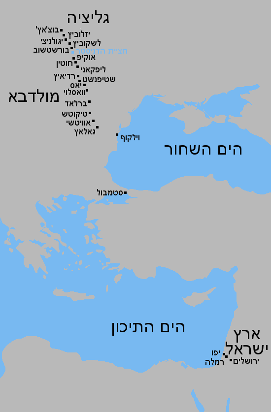 מפת המסע בספר בלבב ימים